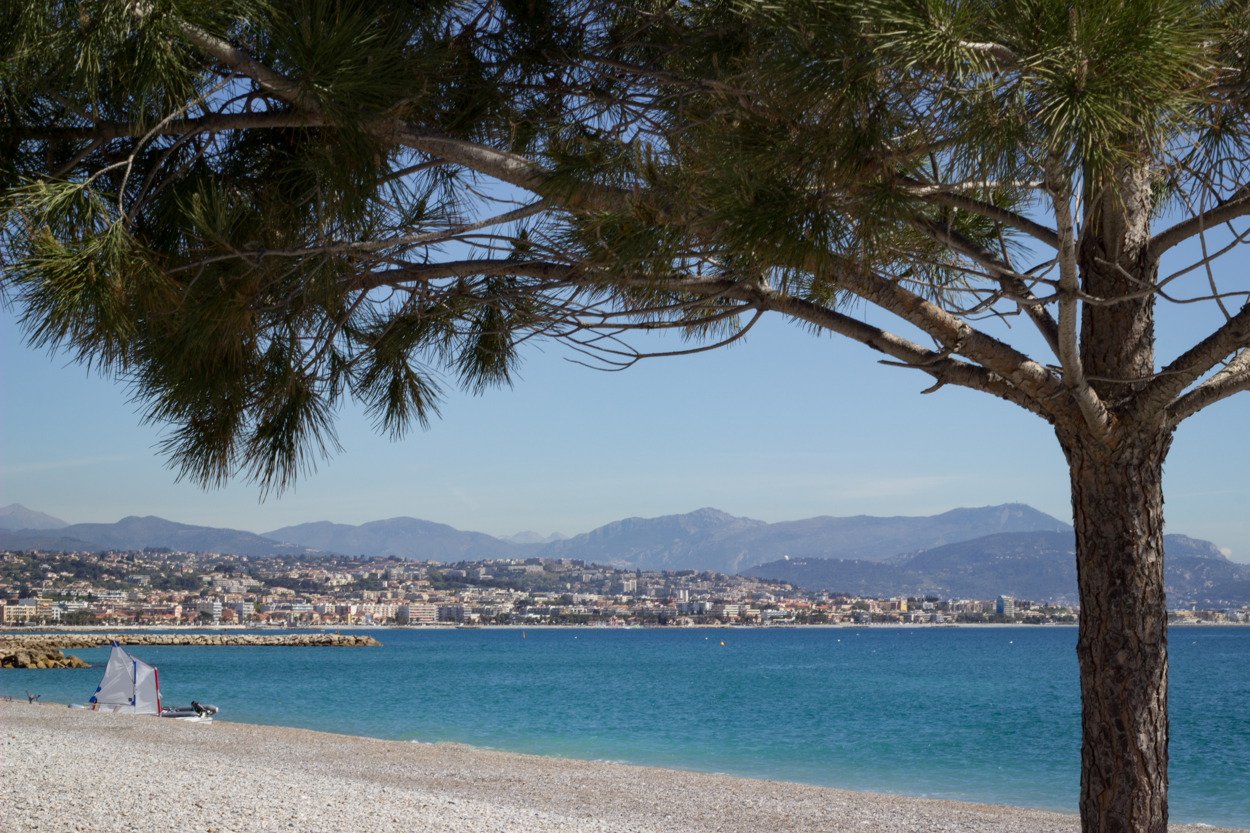 Nice depuis la plage de Villeneuve-Loubet